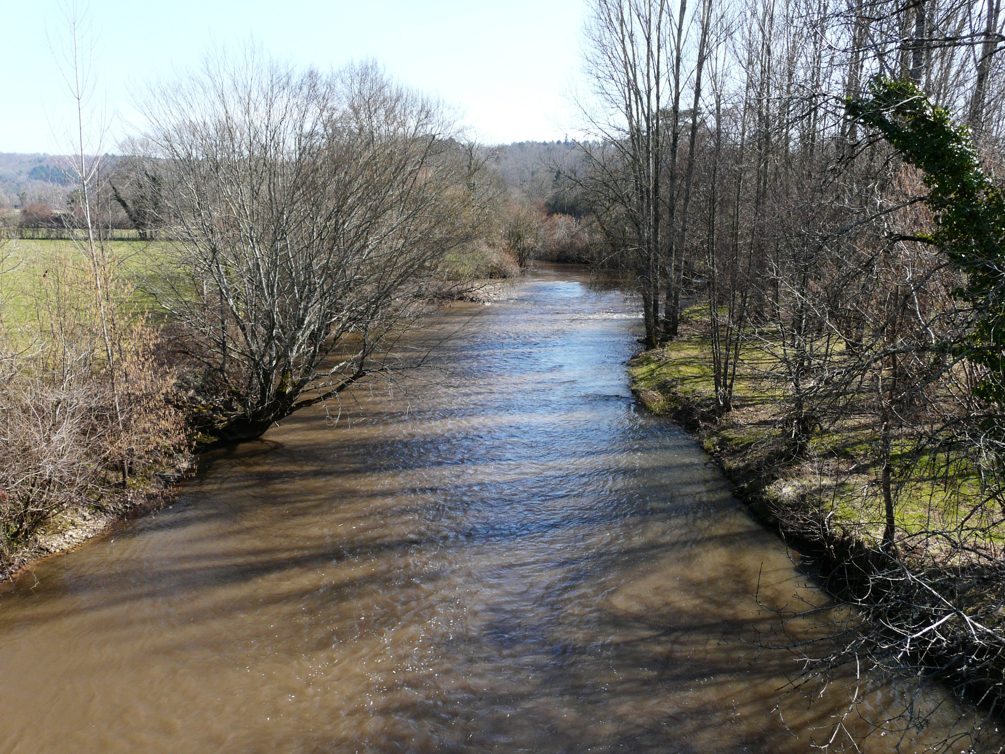 L'Auvézère en amont du pont de la route départementale 5, à la Roquette, entre Bassillac (à gauche) et Eyliac, Dordogne, France.